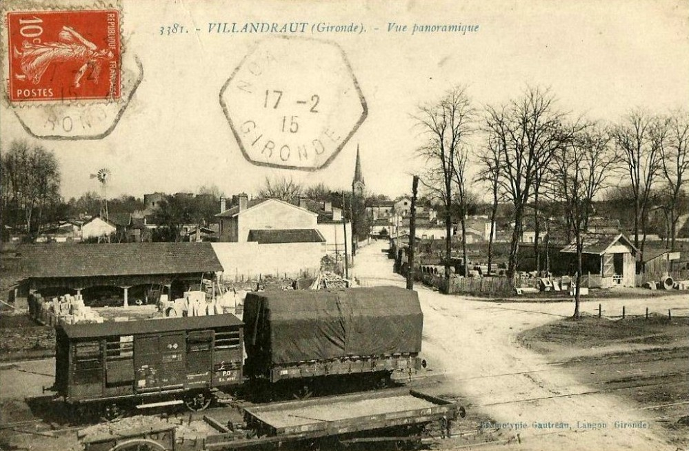 Villandraut